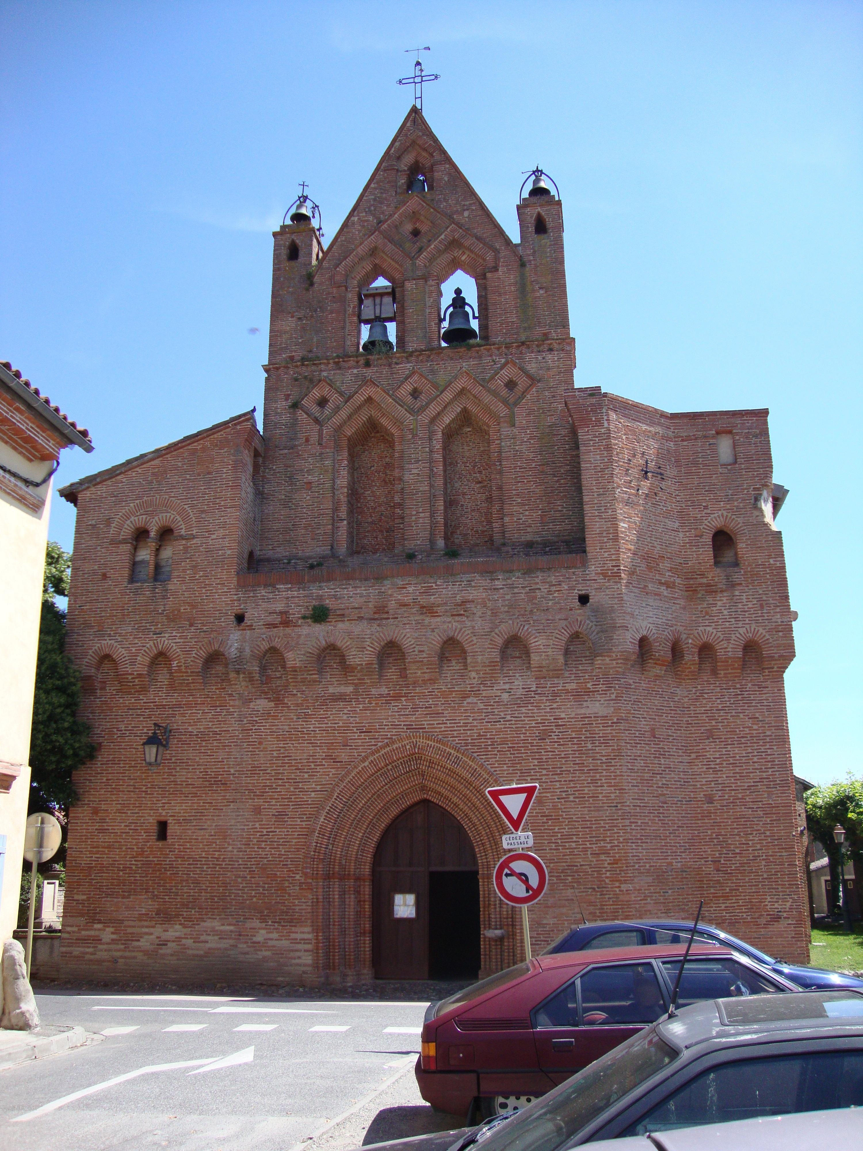 Plaisance-du-Touch (Haute-Garonne, Fr) église, façade